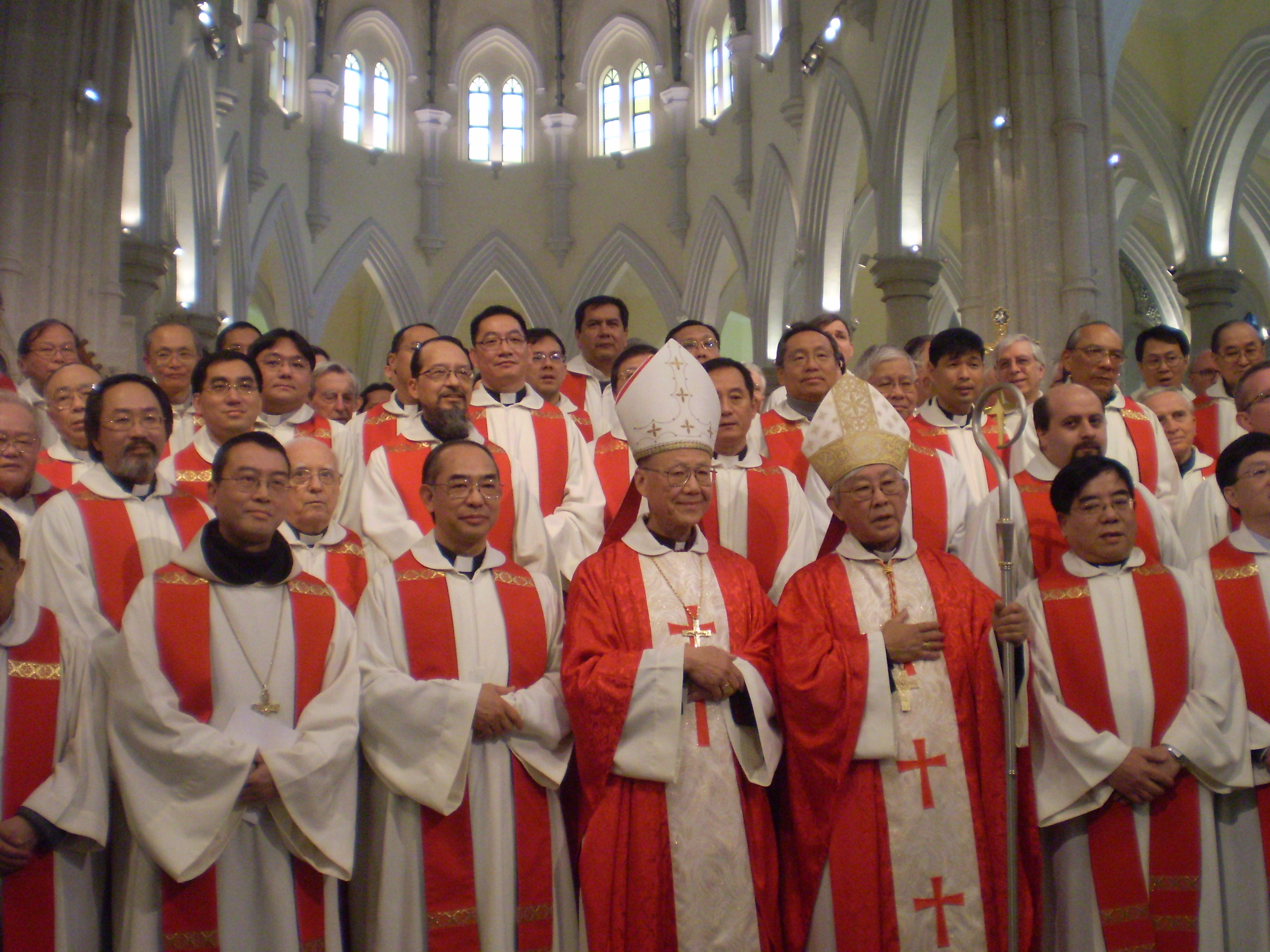 天主教香港教區一眾聖職人員攝於湯漢主教就任助理主教祈福共祭彌撒後